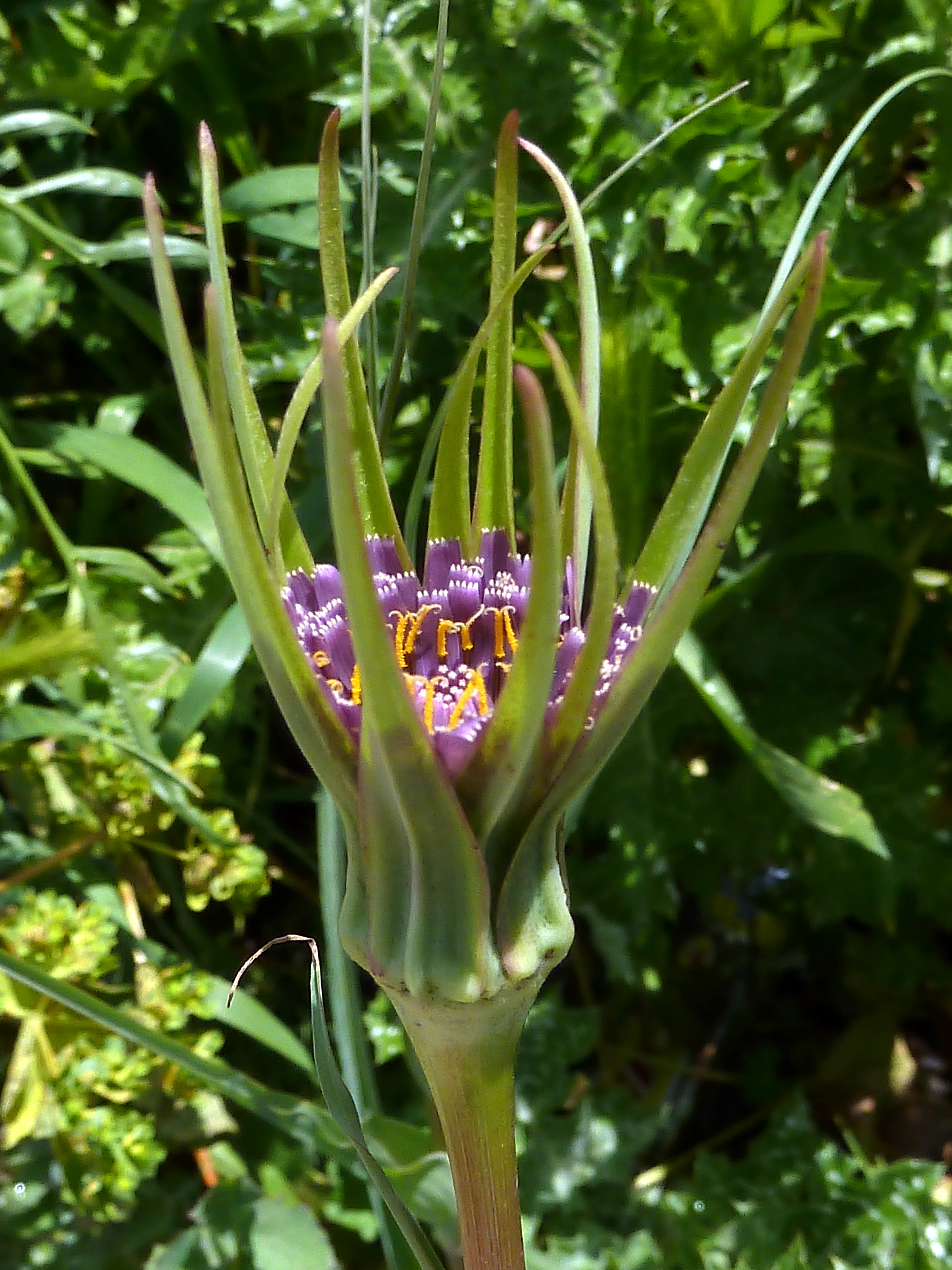 Tragopogon porrifolius. - Capítulo en floración incipiente - c./ del Transformador, Nuevo Baztán (Provincia de Madrid, España).